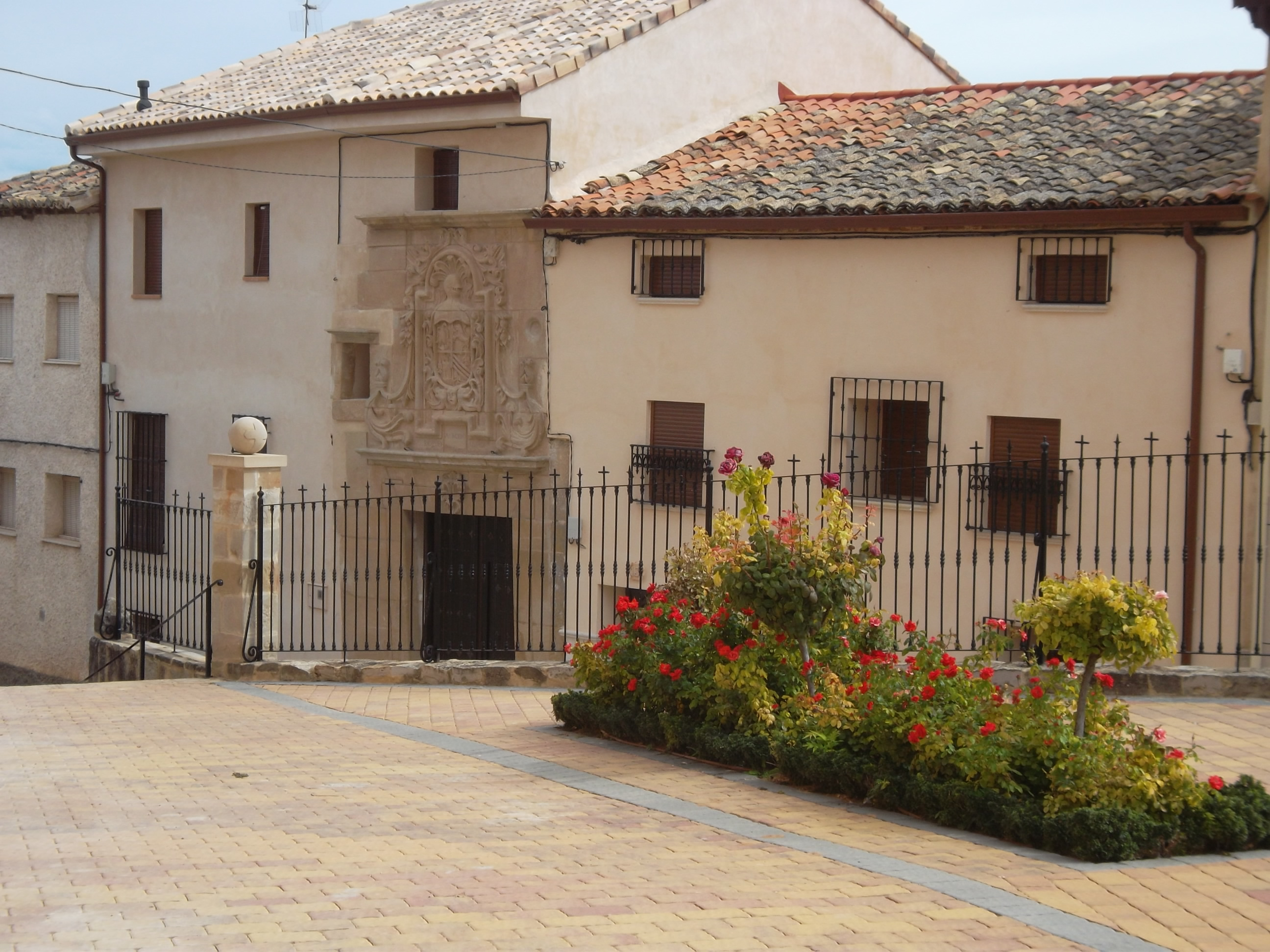 Millana-El pueblo hace gala de la arquitectura popular alcarreña y conserva alguna casa señorial con el escudo de armas en la fachada.